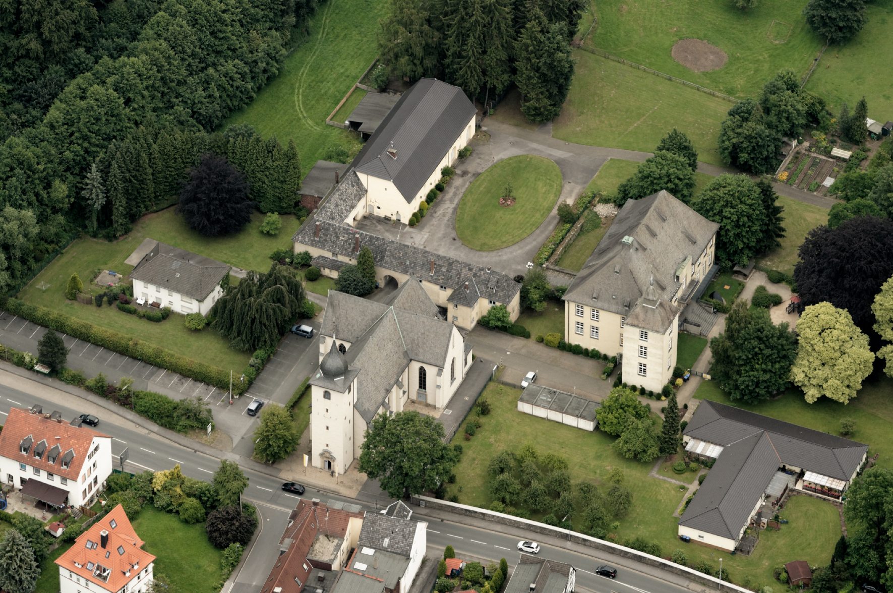 Fotoflug Sauerland Nord. Hemer: Katholische Pfarrkirche St. Peter und Paul und Herrenhaus Haus Hemer The making of this document was supported by the Community-Budget of Wikimedia Germany.